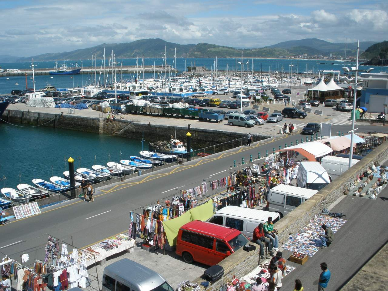 Puerto de Getaria